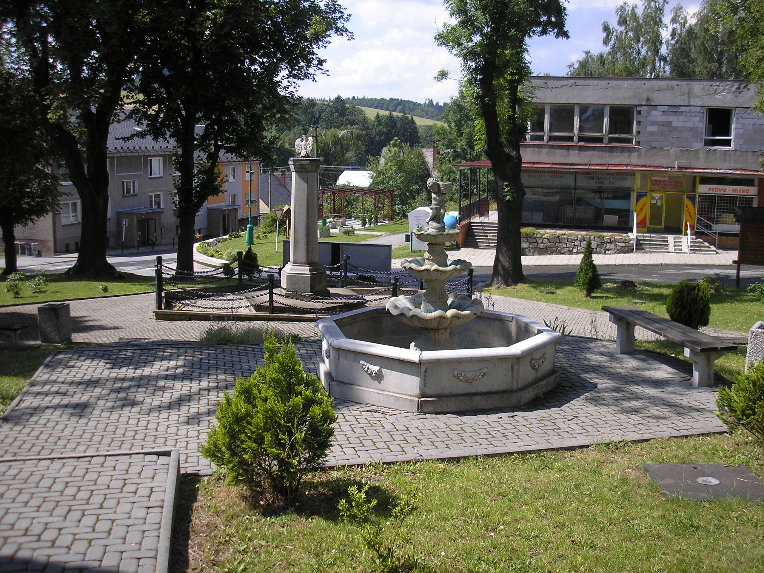 Náměstí v Ryžovišti